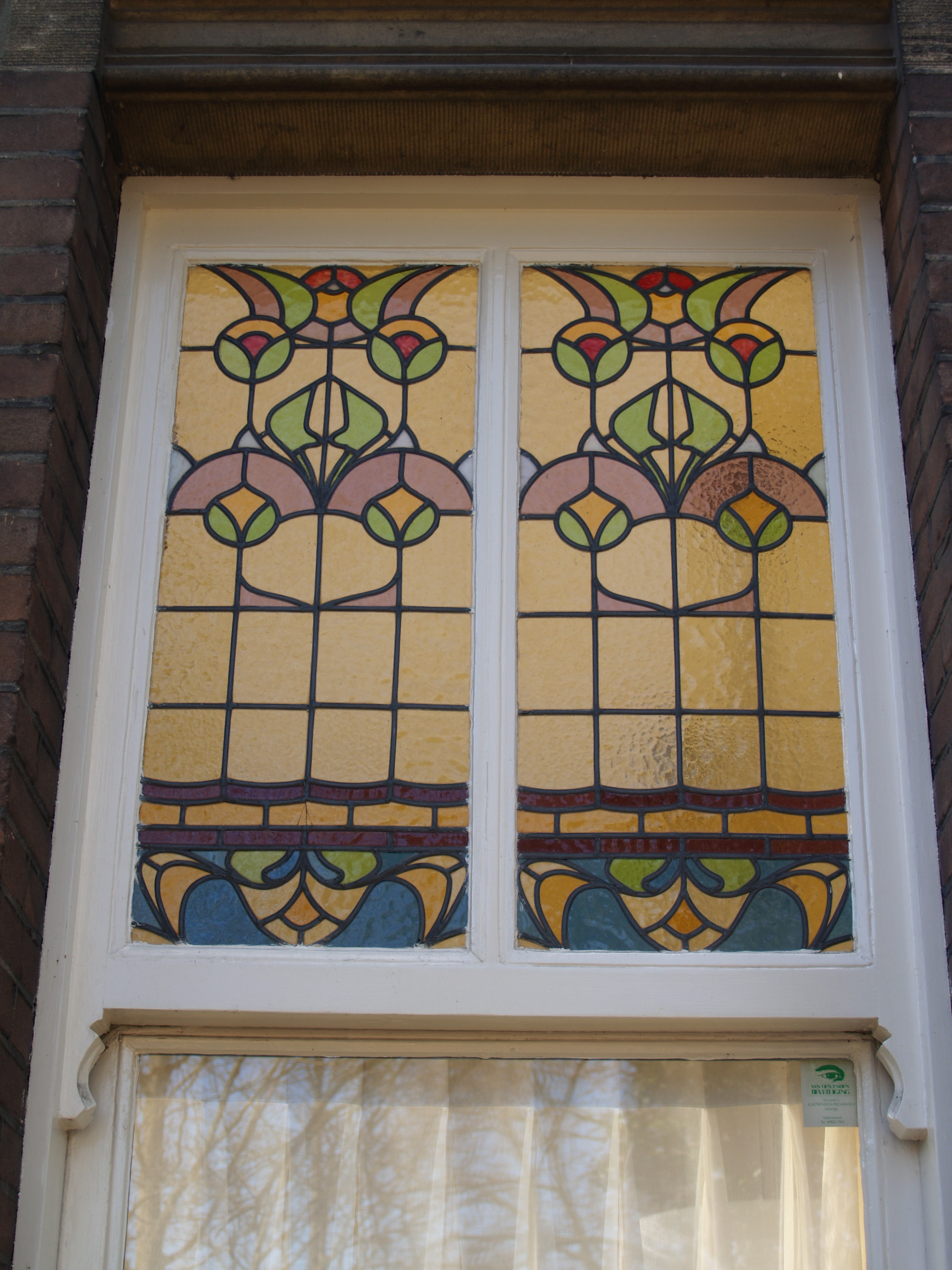 Notariskantoor te Valkenswaard.